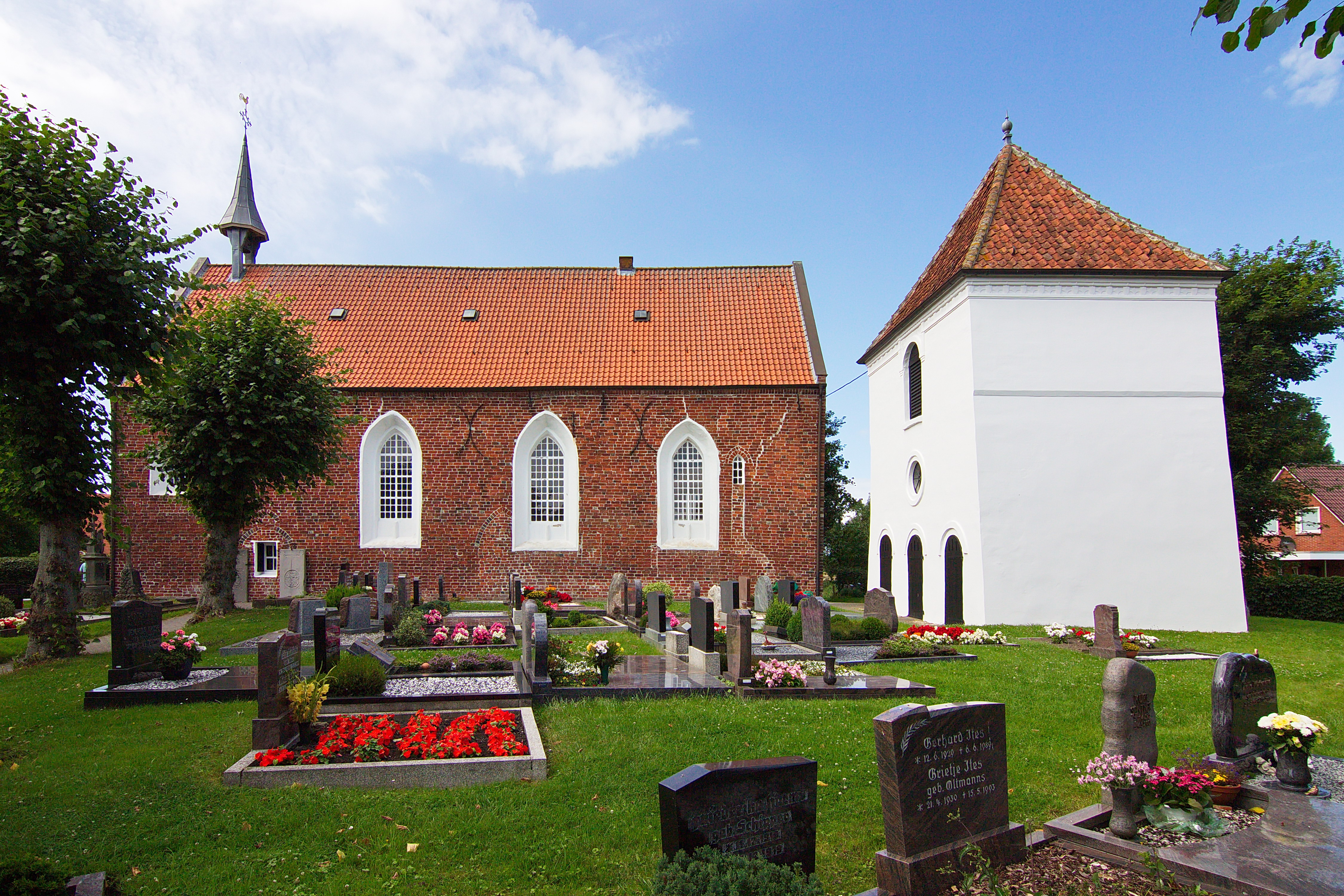 Kirche Upleward (Krummhörn), Niedersachsen, Deutschland